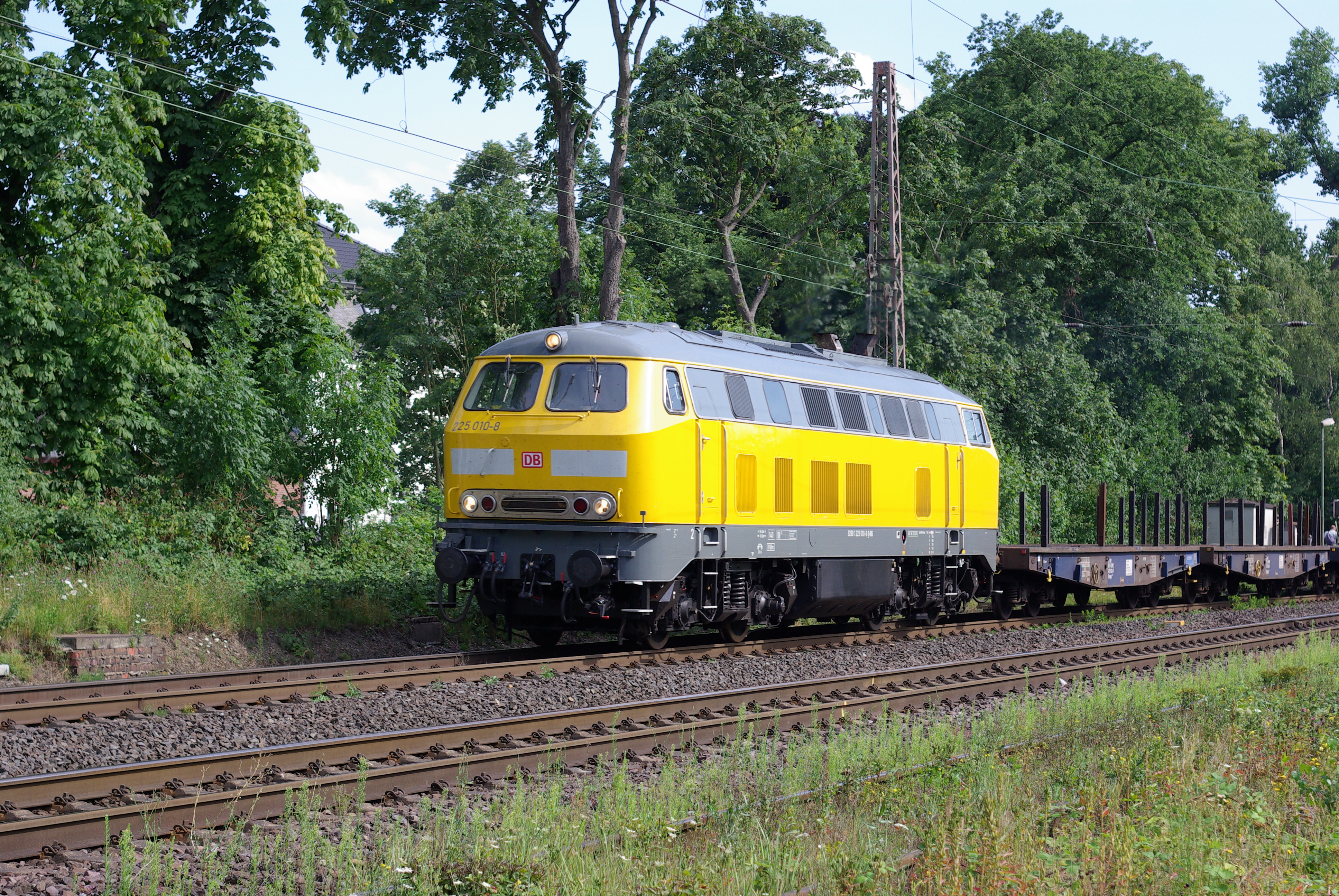 DB 225 010-8 von DB Bahnbau am 1.8.2015 in Ratingen-Lintorf. Die Lok ist seit Februar 2015 in Bahnbau-Gelb unterwegs.